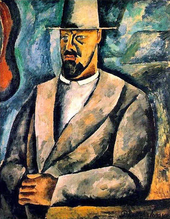 Self-portrait